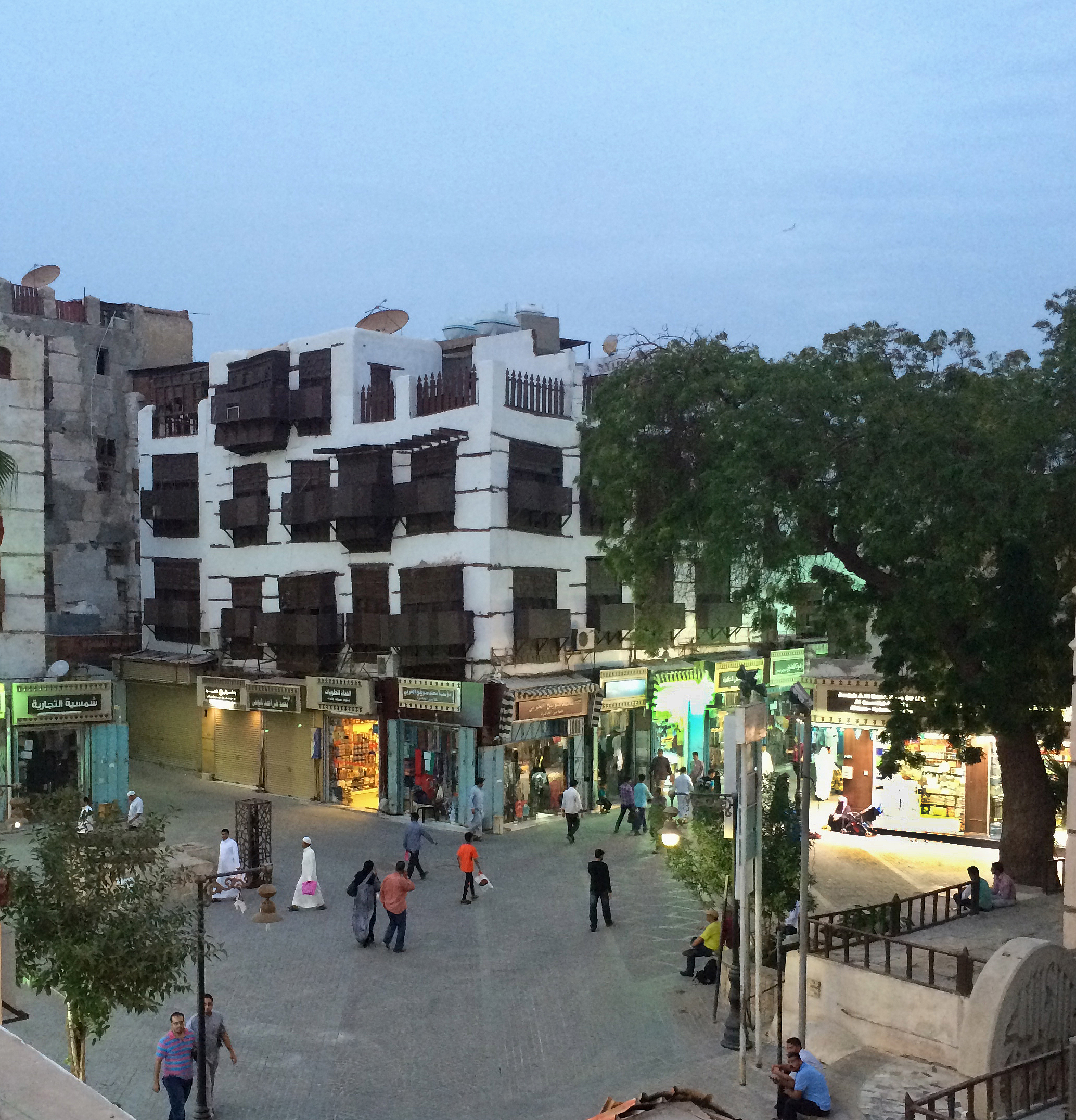 منزل نصيف